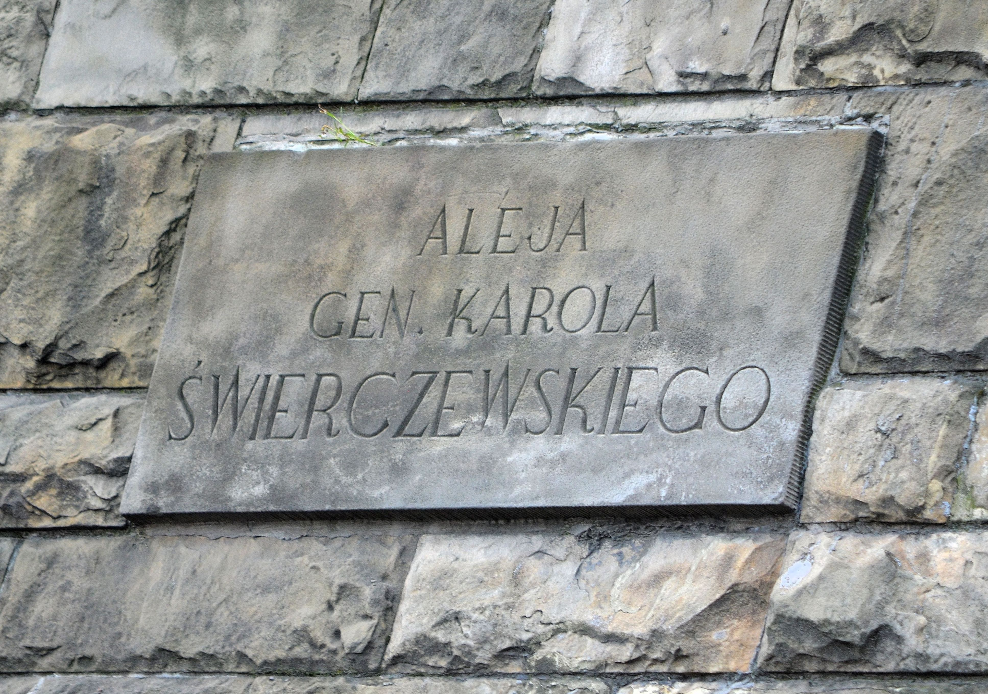 Zachowana tablica z dawną nazwą al. "Solidarności" na murze oporowym przy tunelu Trasy W-Z w Warszawie